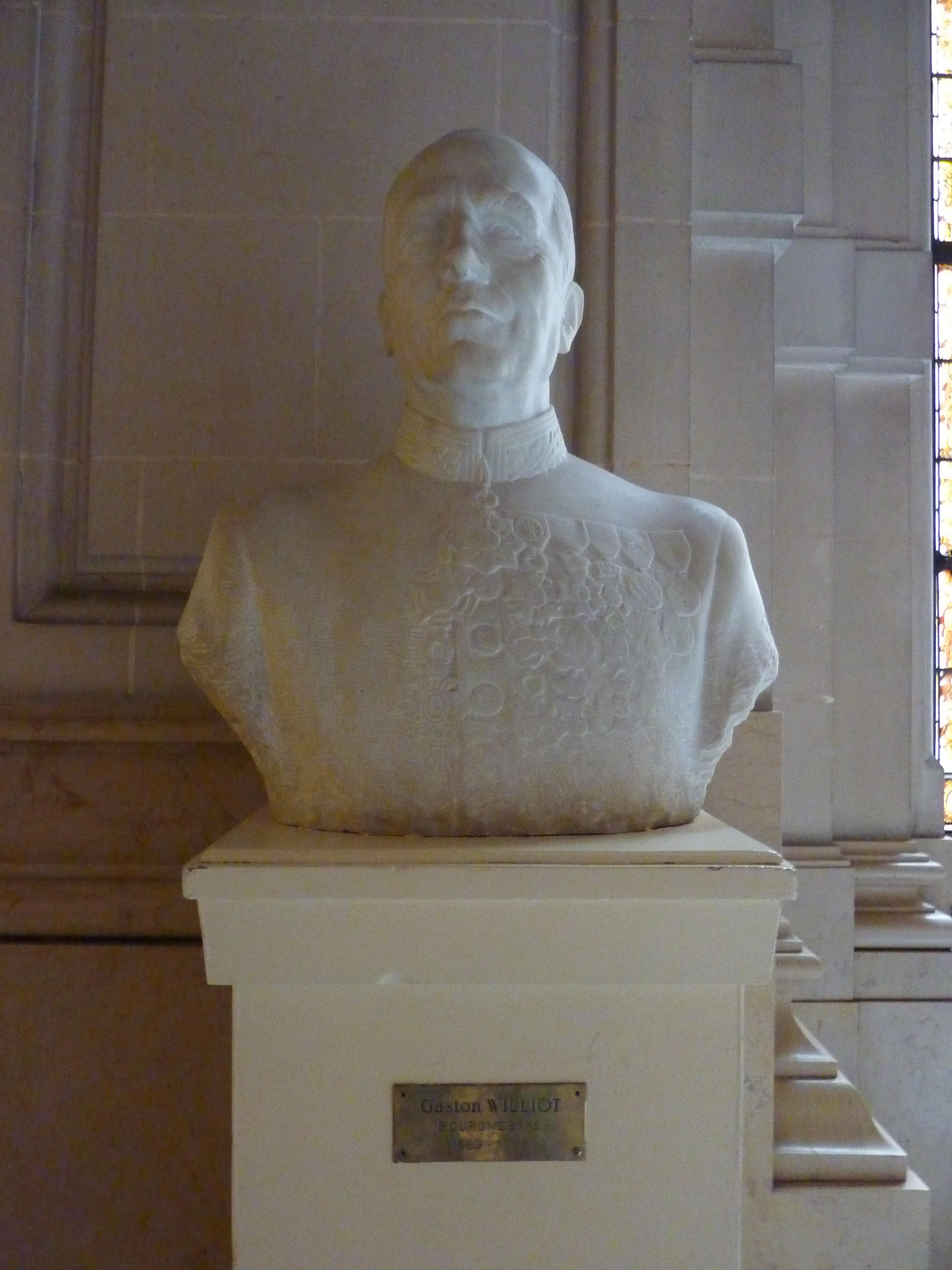 Gaston Williot